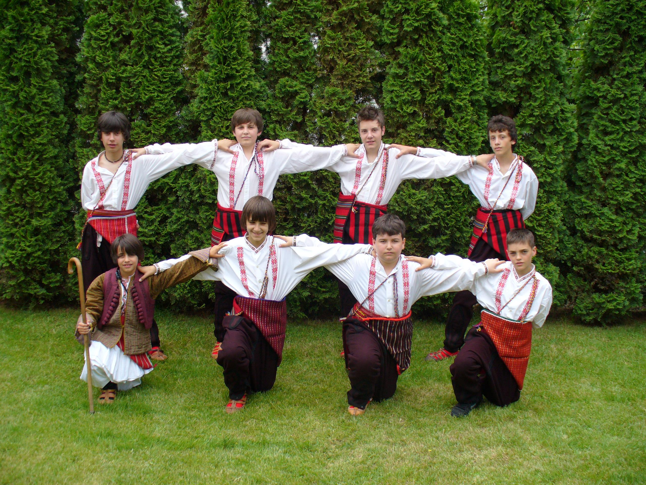 Мајсторите се спремни, ги чекаат тепсиите и момите.